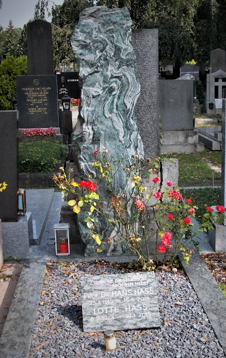 Hans Hass-Friedhof Hietzing